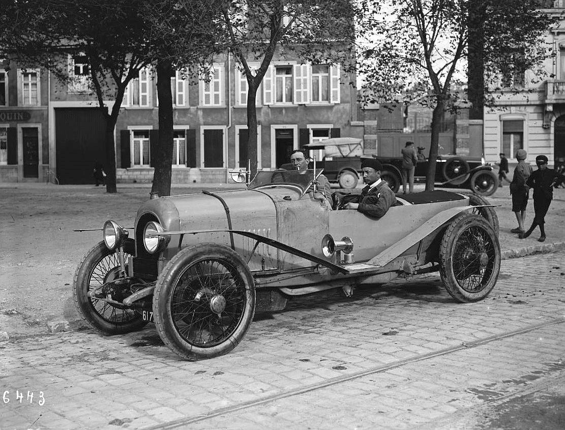 André Lagache à la Coupe Georges Boillot, le 2 septembre 1923 à Boulogne (sur Chenard et Walcker - 5e).